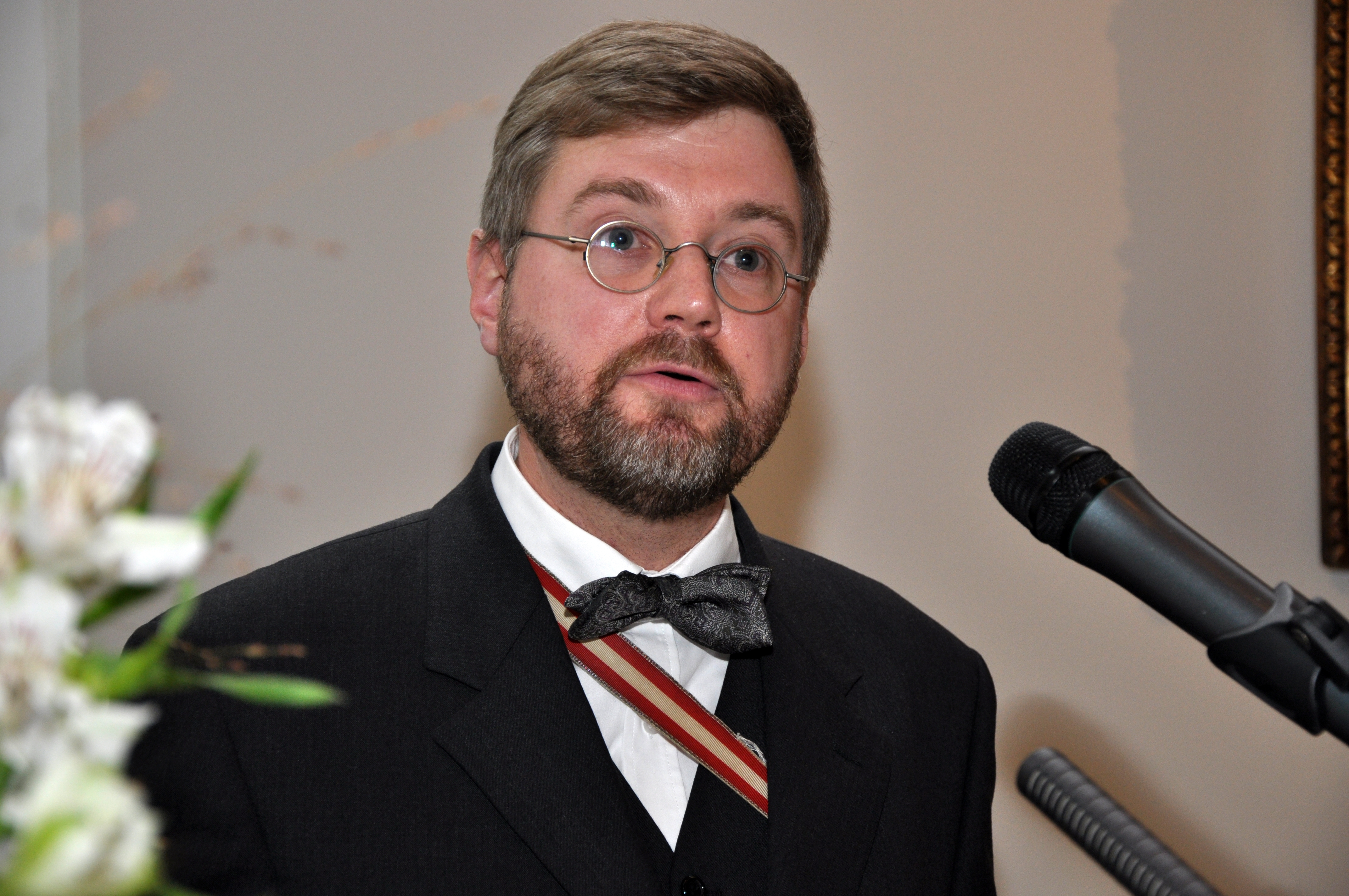 Der Historiker Martin Rackwitz bei einem Vortrag zum 350-jährigen Jubiläum der Christian-Albrechts-Universität zu Kiel im Kieler Yachtclub.